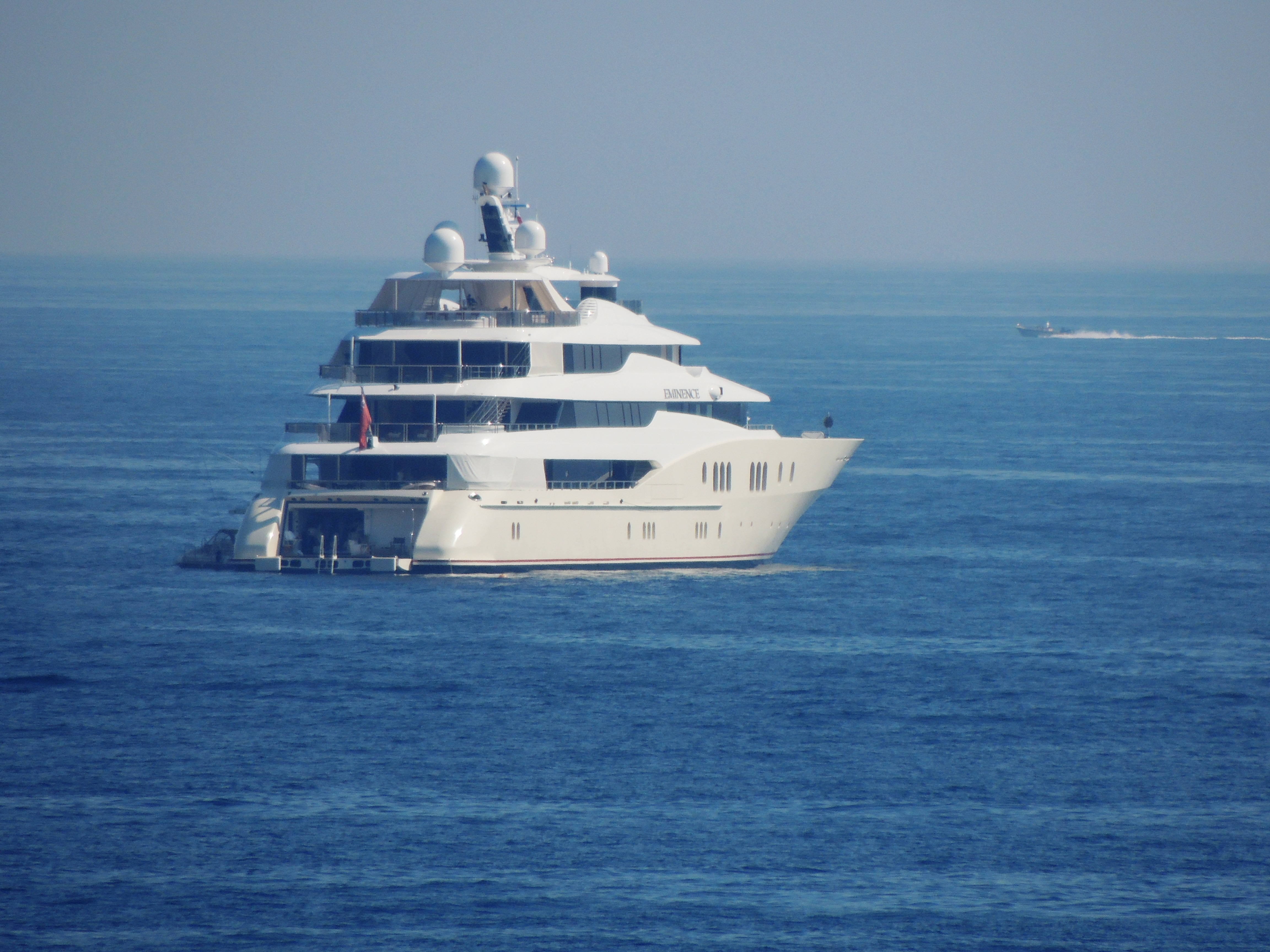 Eminence Yacht